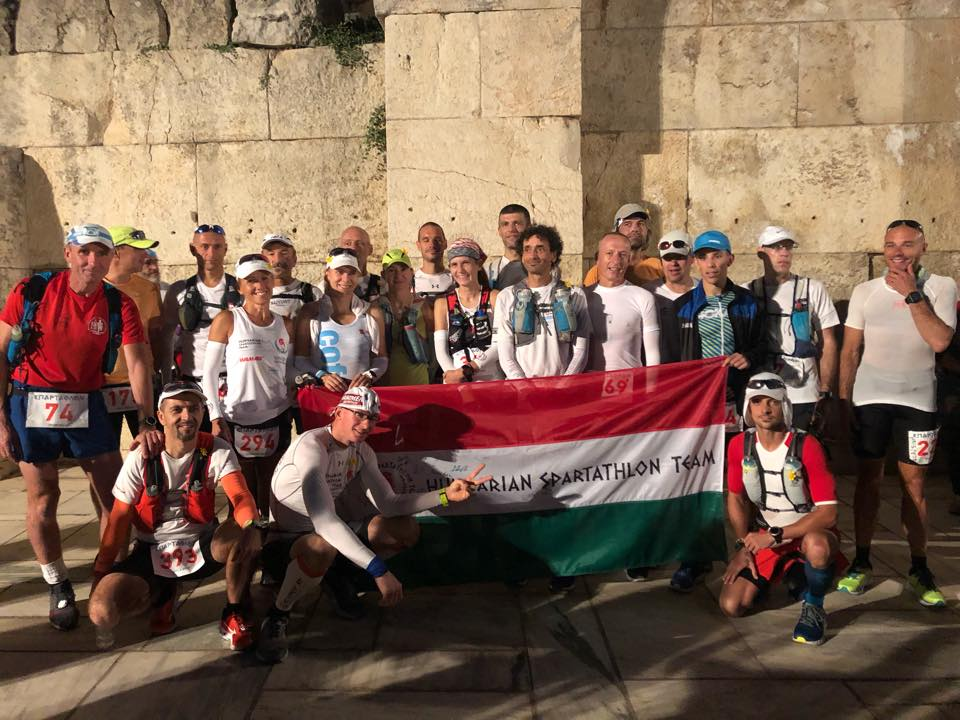 A rajt előtti csapatfotó.